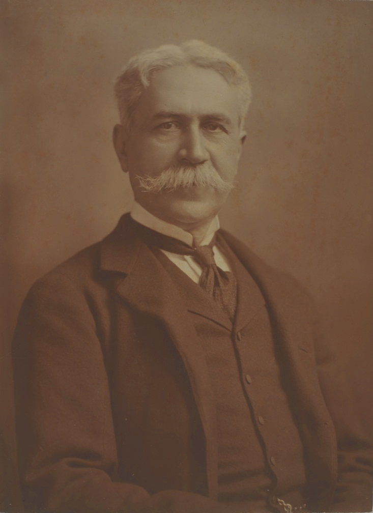 Joaquim Nabuco como ministro plenipotenciário, 1902.